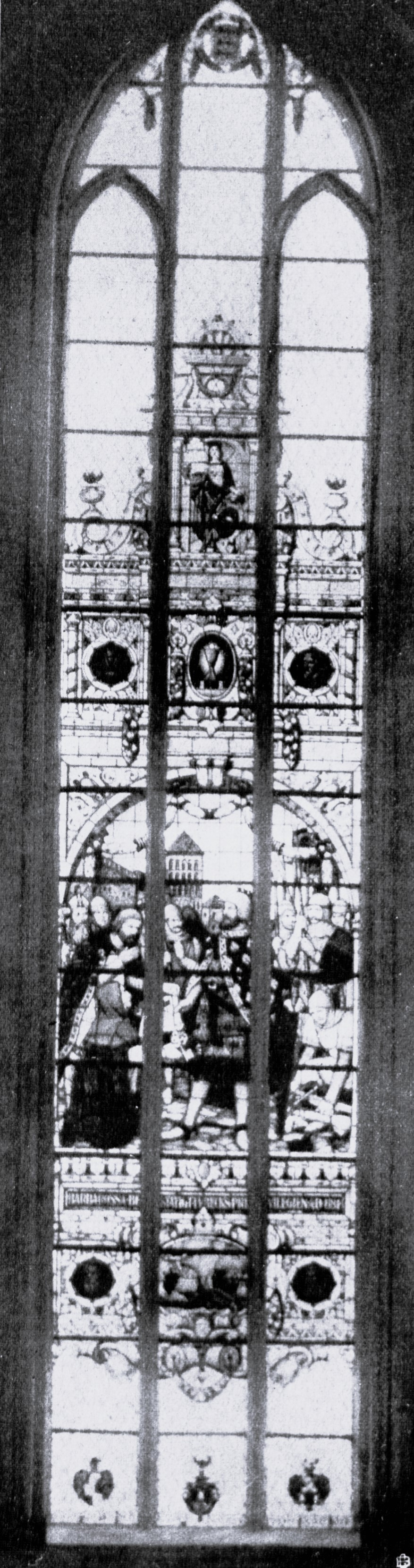 Das vom Kaiser Marienkirche gestiftete Fenster mit Glasmalerei. Anmerkungen: 11m hoch, am Sockel befinden sich die Wappen der Hohenzollern und der Nürnberger Burggrafen, die bildlichen Darstellungen, stellen Episoden aus der lübeckischen geschichte dar, das Hauptbild zeigt die Bestätigung der Privilegien durch Kaiser Friedrich Barbarossa im Jahre 1181, im oberen Drittel deuten Bibel und Kelch auf die Einführung der Reformation in Lübeck hin, zu beiden Seiten befinden sich Medaillien mit dem Bildnis des Reformators Bugenhagen (erster Lübecker Superintendent), in der Spitze ist die Lubeca mit dem Modell eines Segelschiffes und dem Stadtwappen dargestellt, im Spitzbogen selbst das von schwebenden Puten umkränzte alte schwäbische Wappenschild der Hohenstaufen.